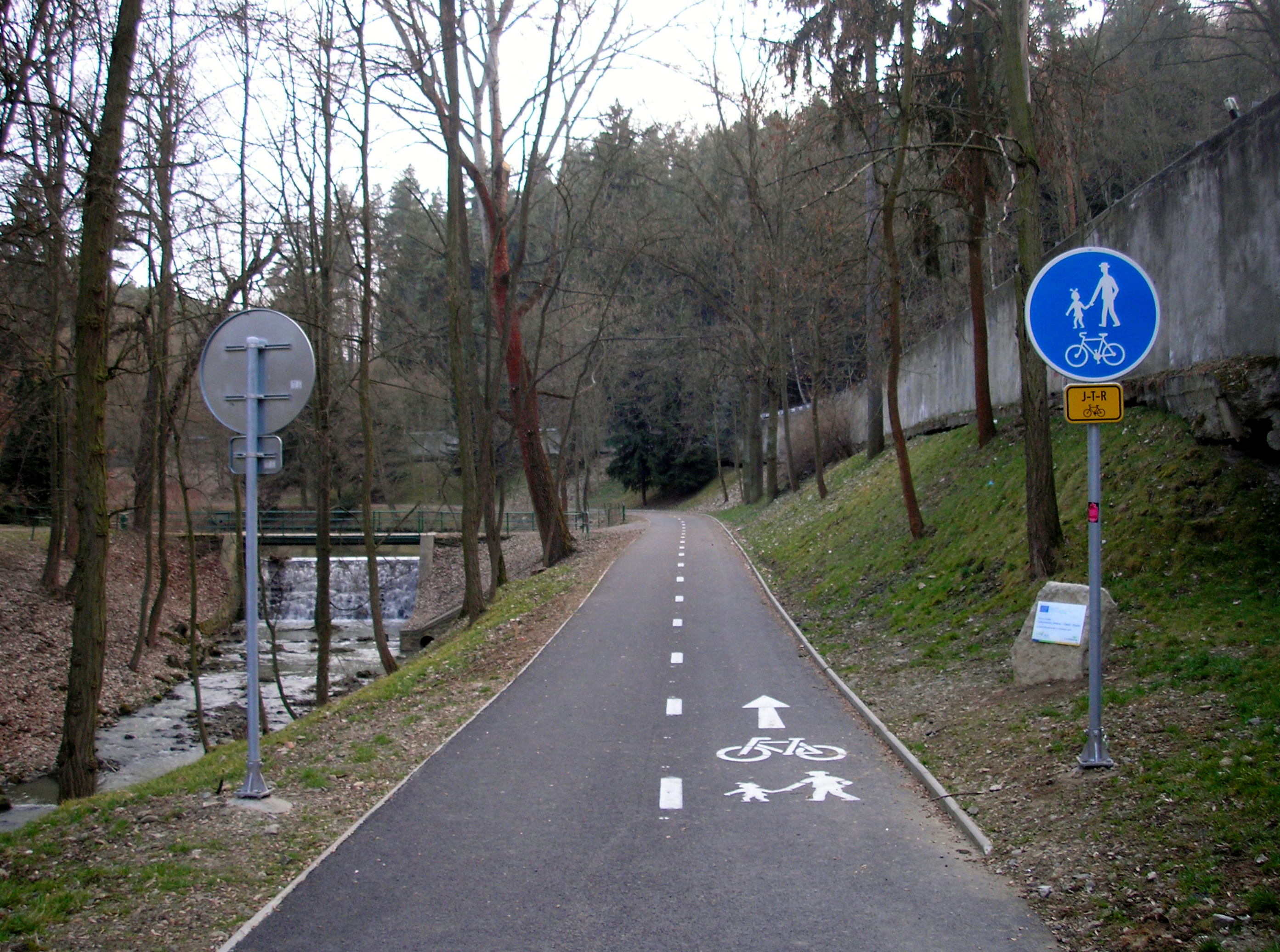 Záčátek úseku cyklostezky Jihlava - Třebíč - Raabs v Libušině údolí v Třebíči